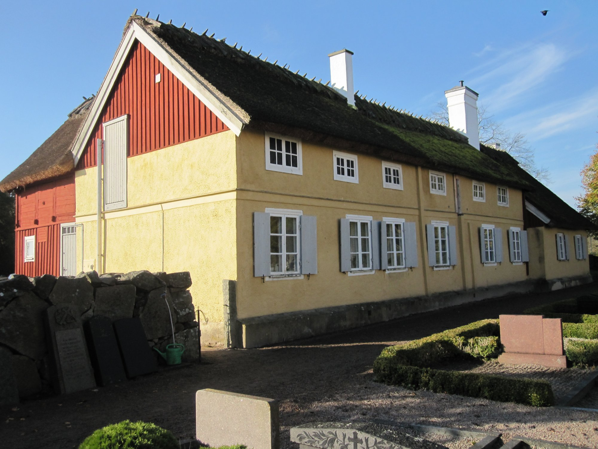 Västra sidan